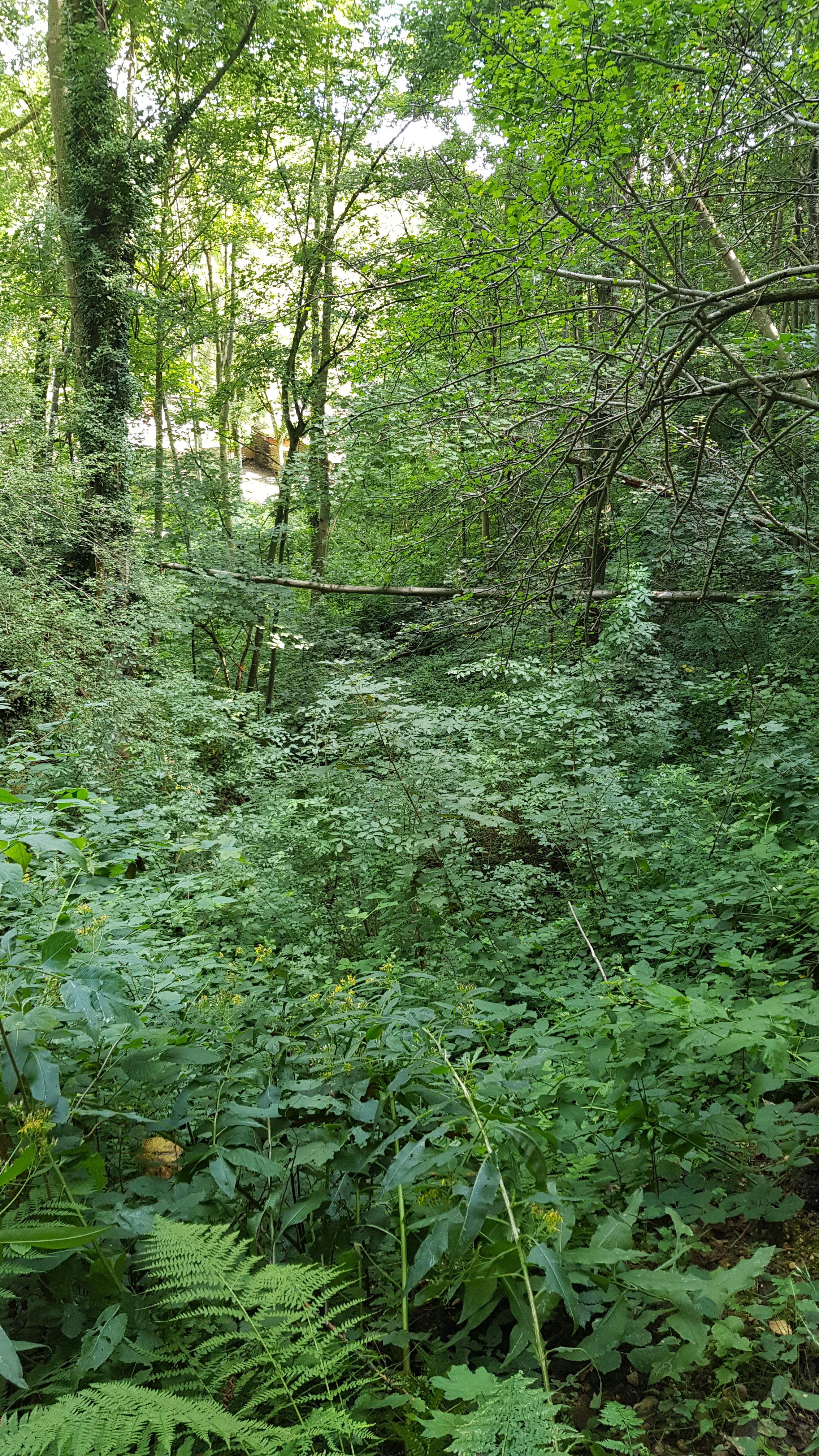 Groeve Oly, Meerssen, Nederland